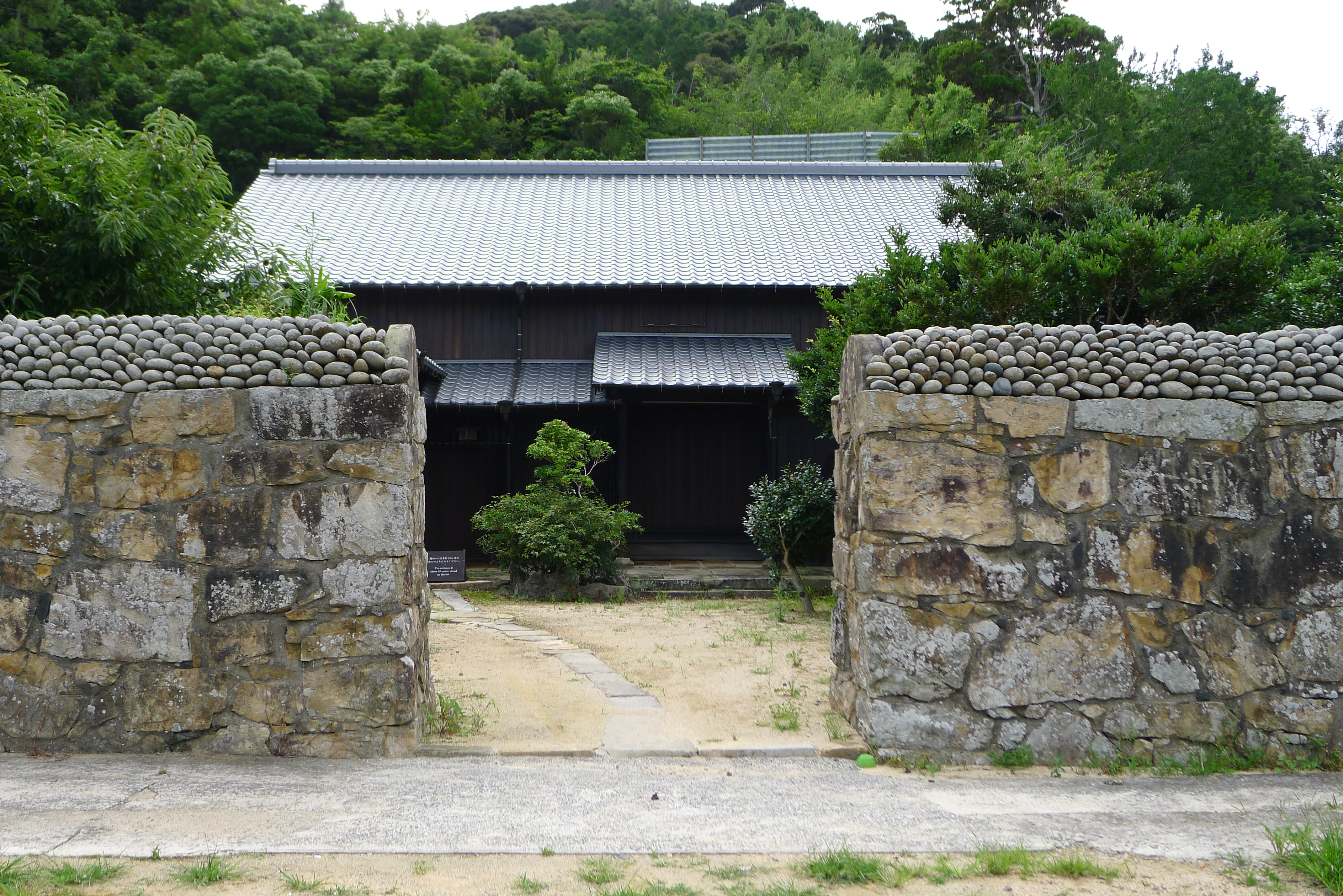 久賀島観光交流拠点センターの門構え